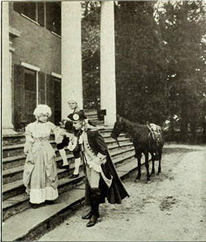 Gene Gauntier.